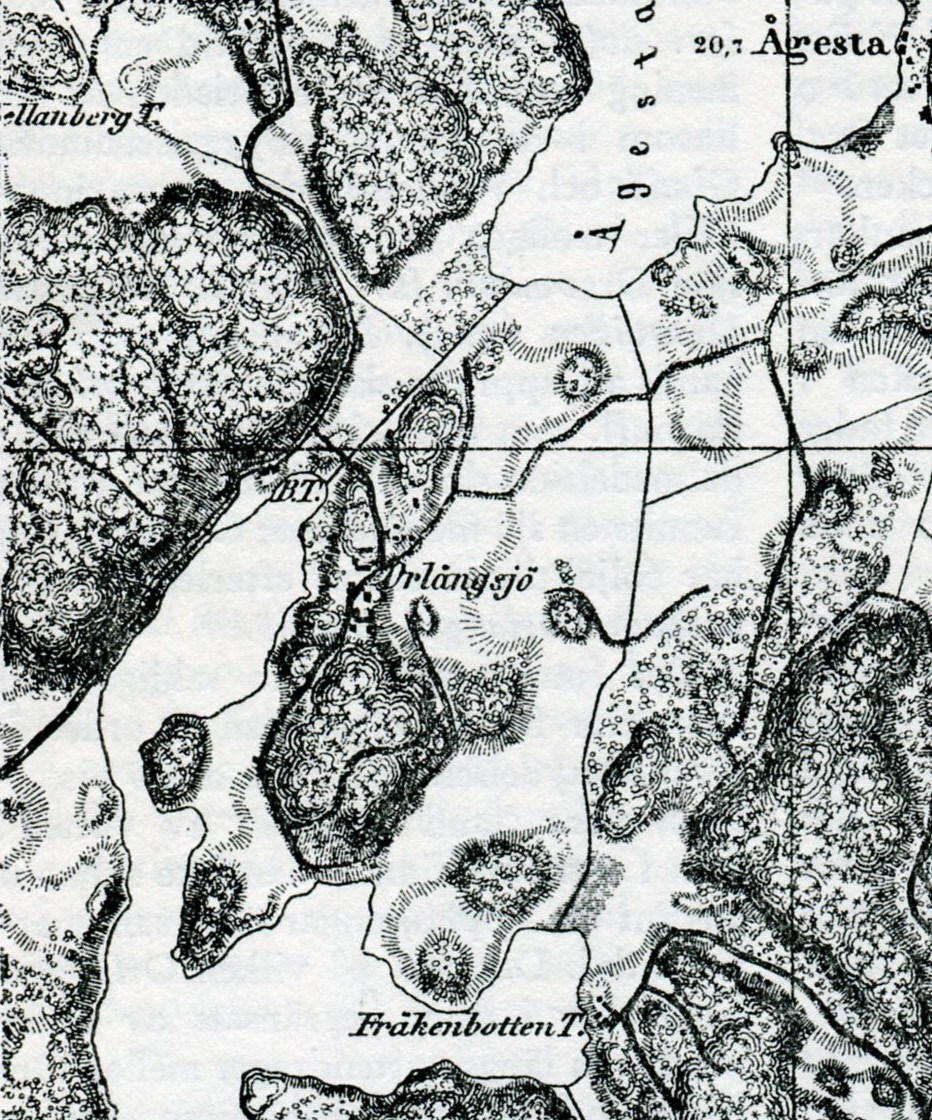 Del av karta "Trakten kring Stockholm" i nio blad utgiven 1861 visande området mellan Orlången och Ågestasjön